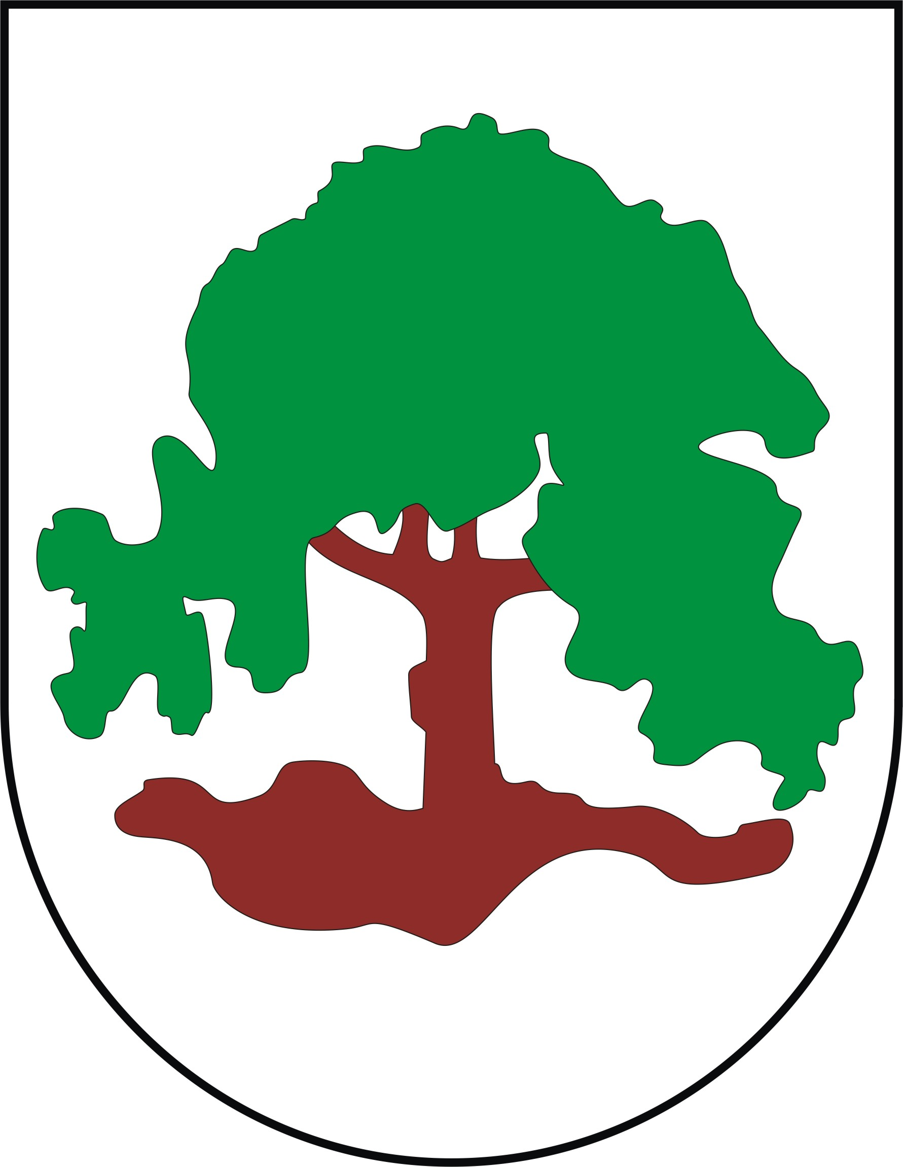 Ortswappen von Kleinröhrsdorf (Gemeinde Großröhrsdorf, Sachsen)